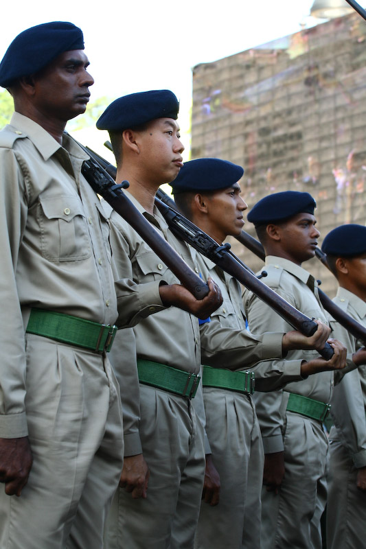 Les opérateurs Spéciaux d'Agents de police pendant la Parade de Jour d'Indépendance malaisienne 50. L'équipe était un consacré pendant Darurat Malaisie Occidentale dans l'an 1948 à 1960.